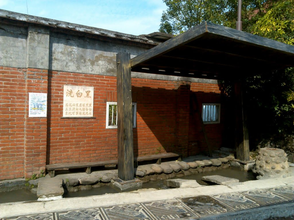 三坑老街 黑白洗